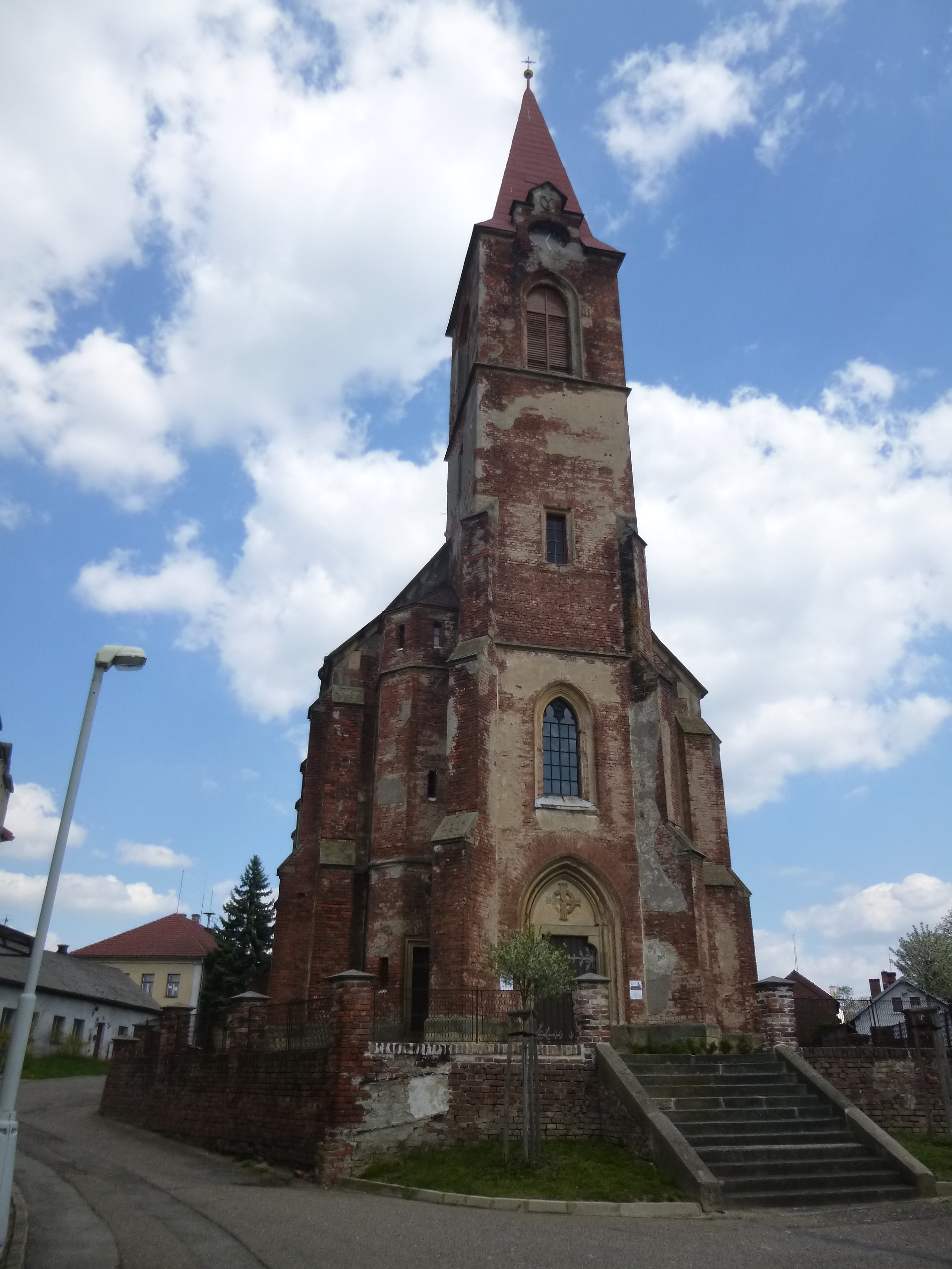 kostel Nejsvětější Trojice v Suché